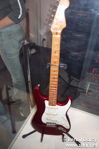 Photos de l'exposition "Pink Floyd Interstellar" à la Cité de la Musique (Porte de la Villette, Paris). Read the story at . Lire le compte-rendu de l'expo sur